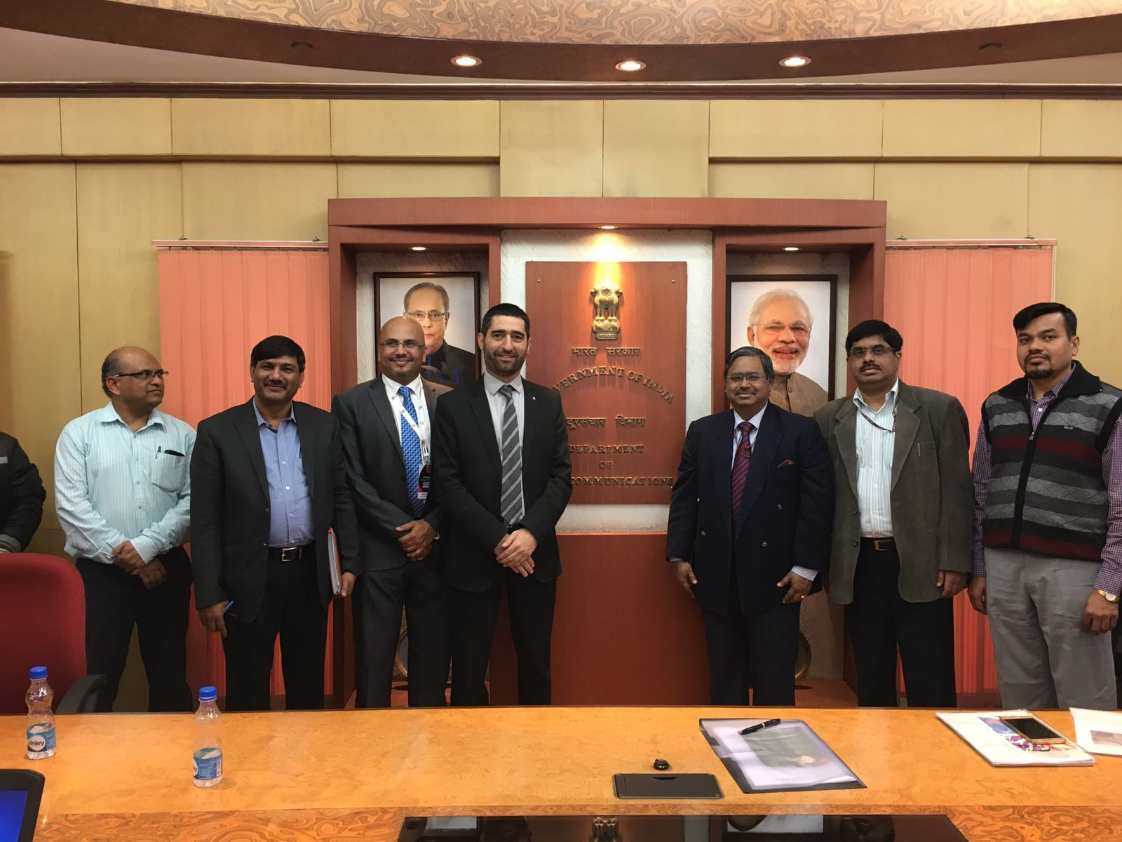 Jordi Puigneró, i el secretari de comunicacions i tecnologia de la informació del govern indi, Shri N Sivasailam, amb les corresponents delegacions abans de la reunió